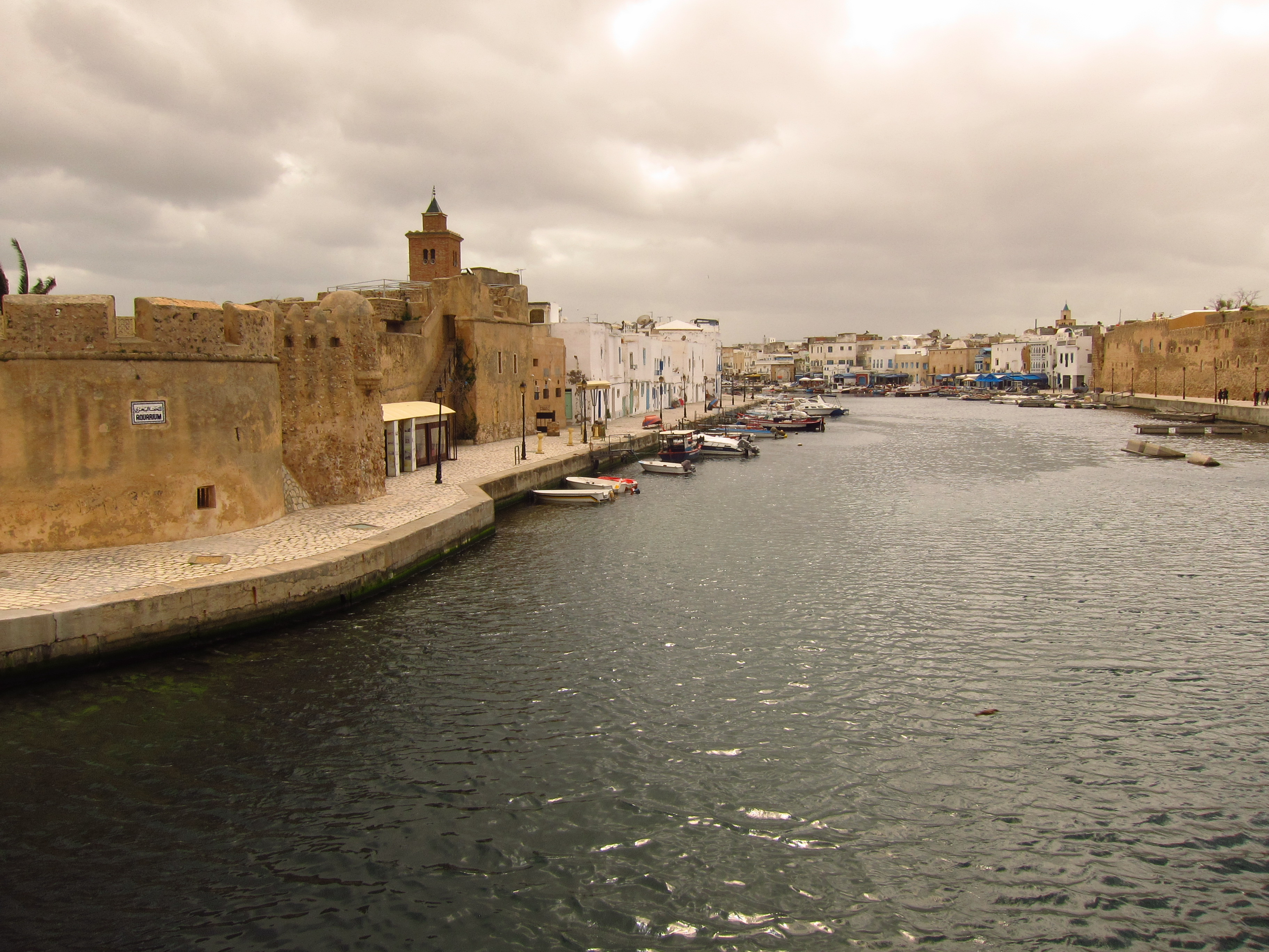 Bizerte marina